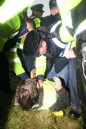 Garda ag tachtadh[fíoras?] agóideoir, Béal an Átha Buí, Samhain 2006.